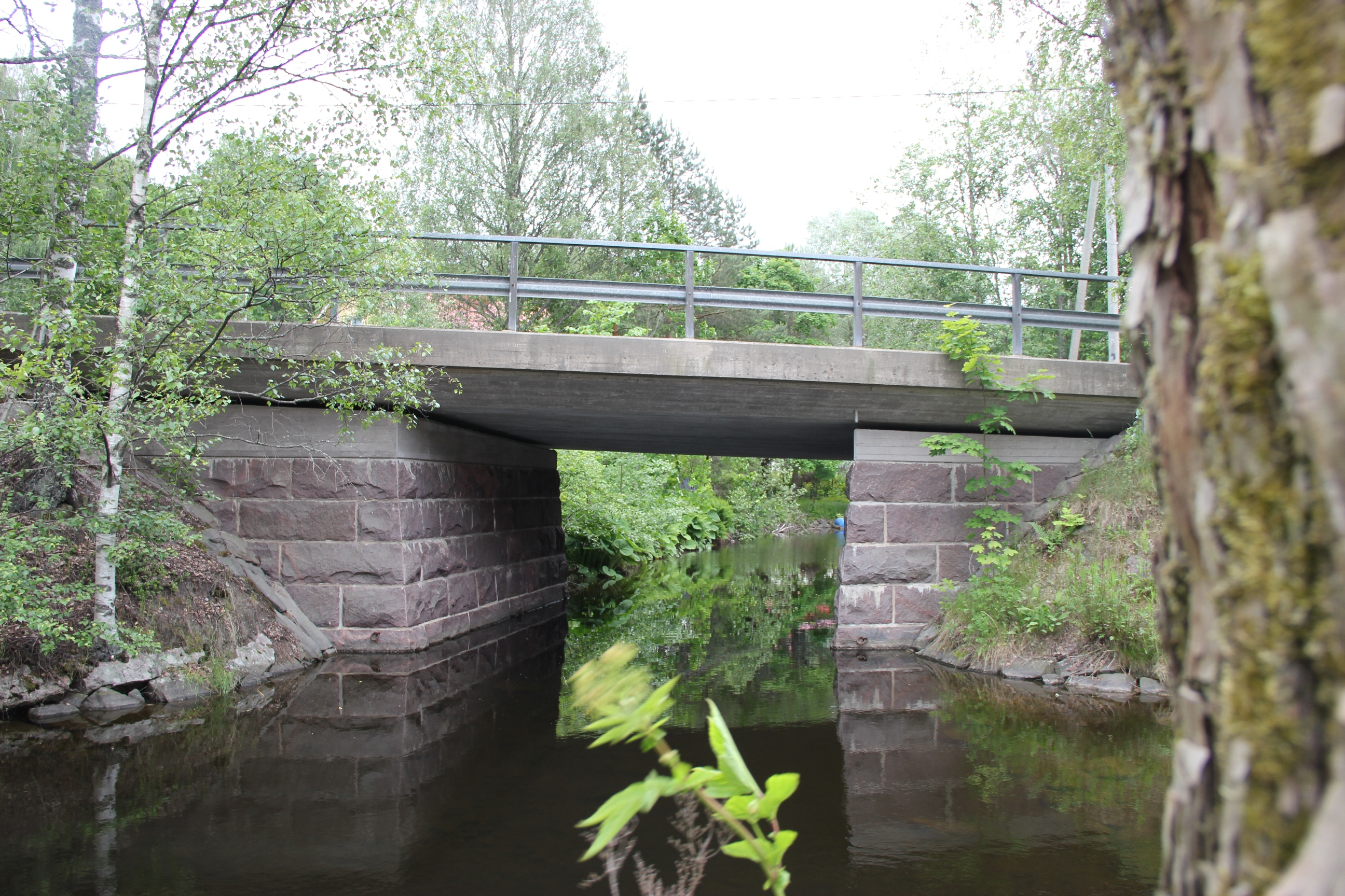 Anskunjoki, Fiskarsintien silta